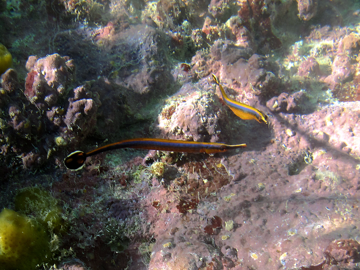 Un syngnathe à double menton (Doryrhamphus bicarinatus) à la Réunion.